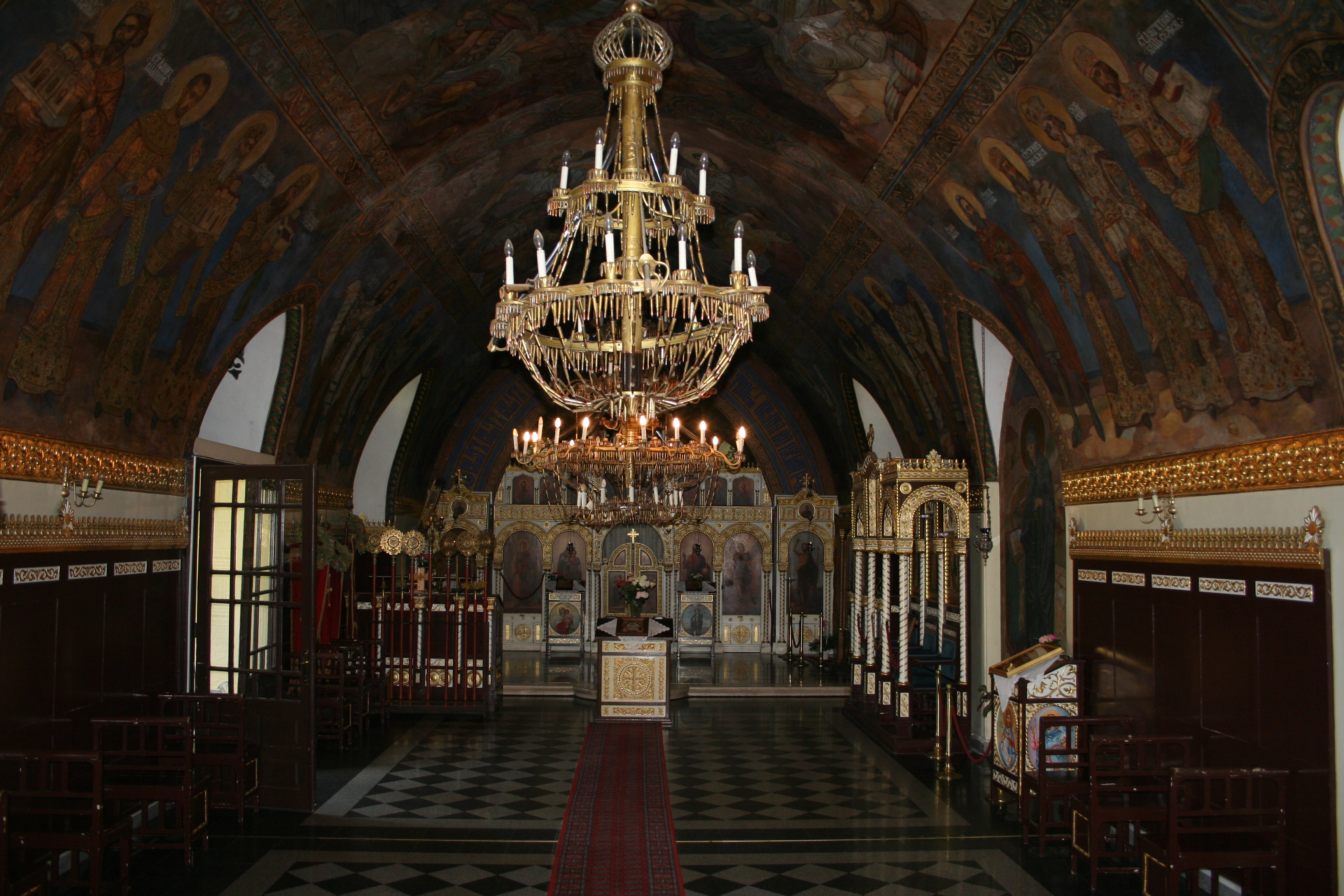 Унутрашњост цркве